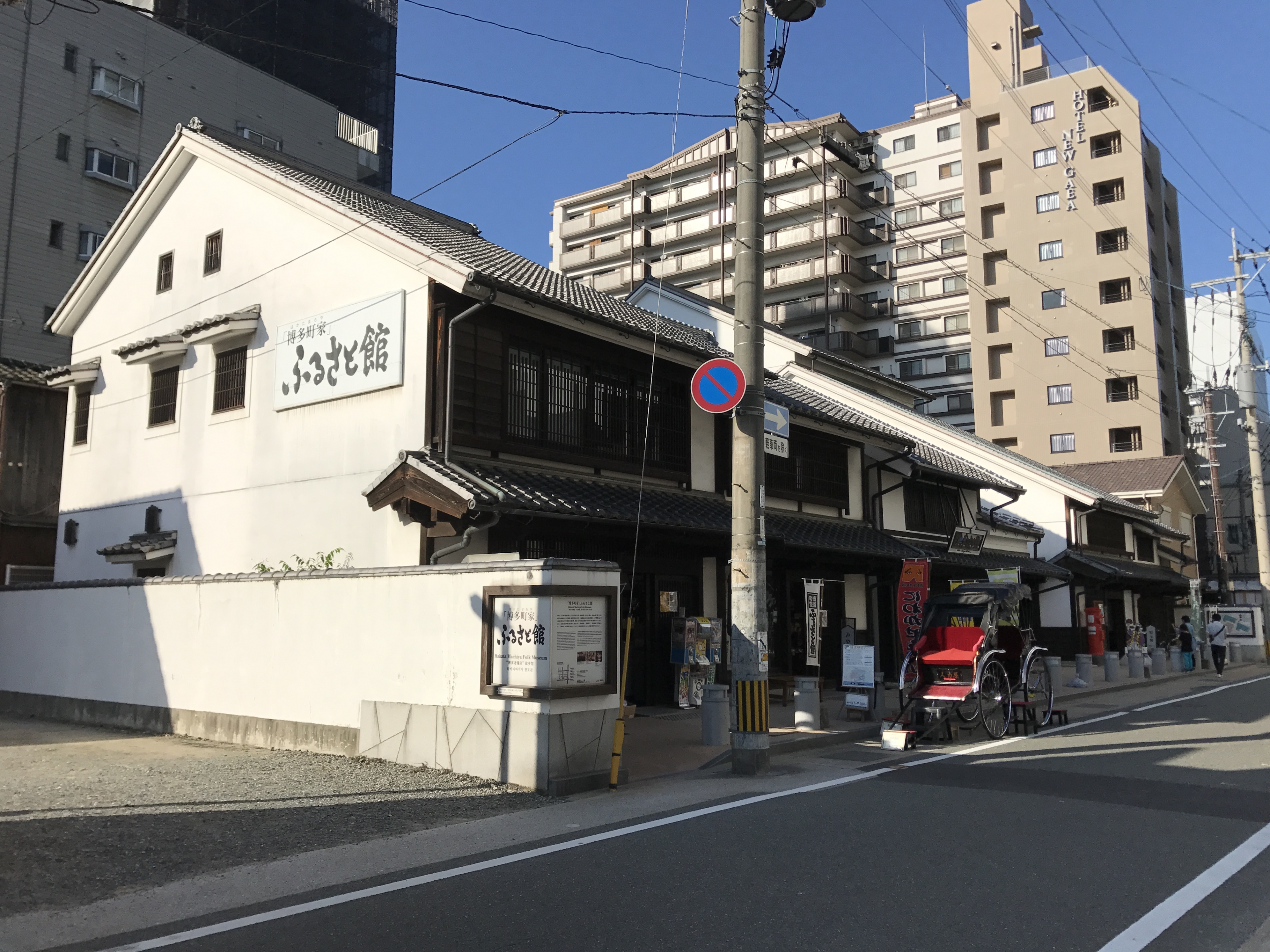 博多町家ふるさと館